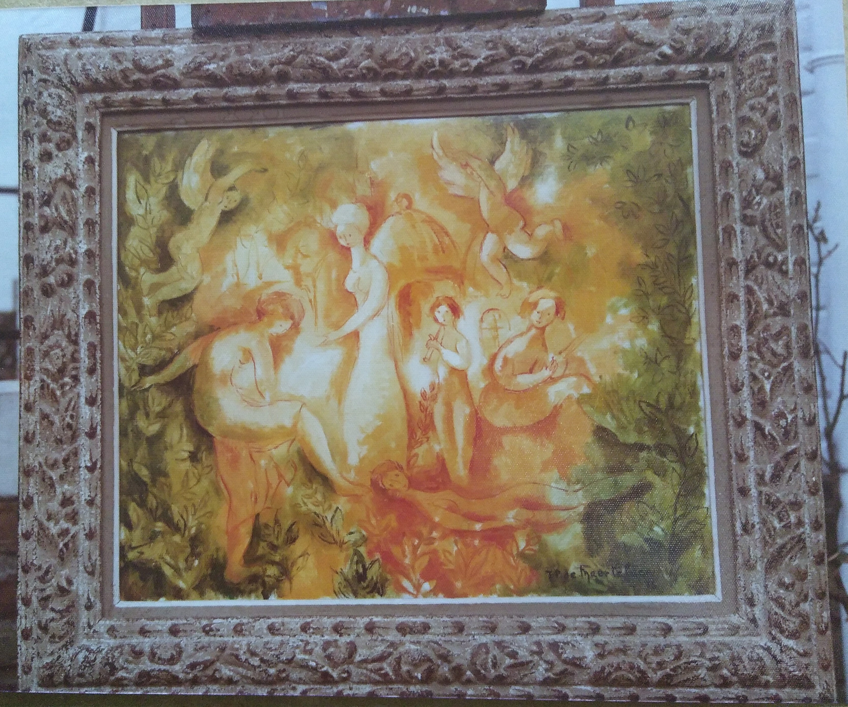 Terre promise tableau de Jean-Pierre de Maertelaer peint en 1976, photo prise à la résidence du peintre à Wemmel Belgique (fournie par son fils en 2020) Localisation actuelle de la toile: inconnue